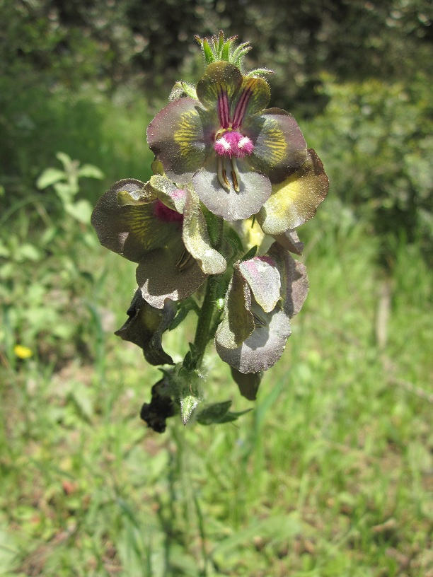 Büyükada-Prinzeninsel/Istanbul im Kiefernwald, sonnenbeschienener Wegrand